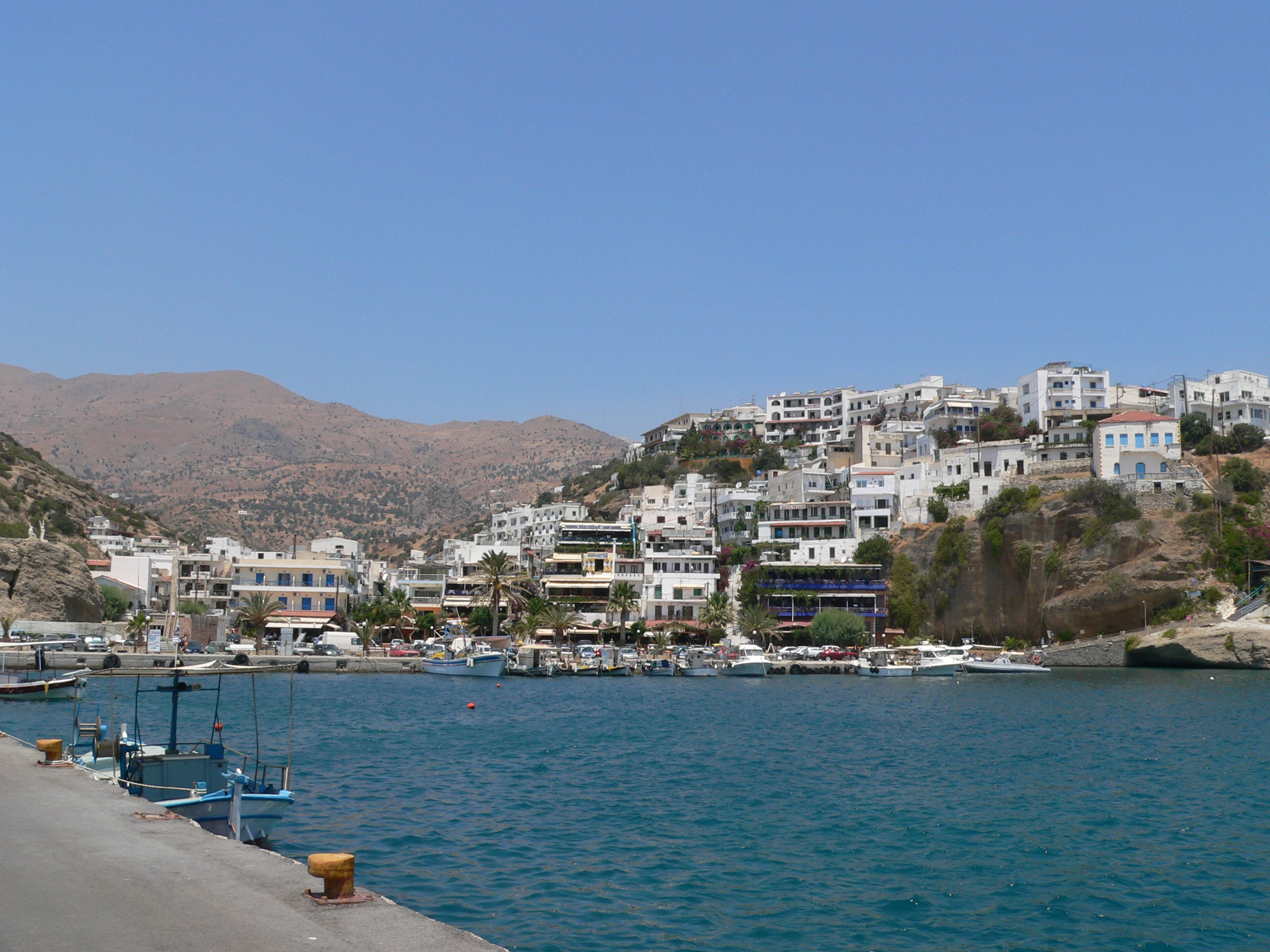 Eigen vakantiefoto